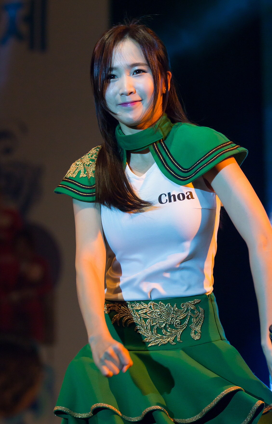 (15.08.22) CRAYON POP 크레용팝 의정부 착한콘서트